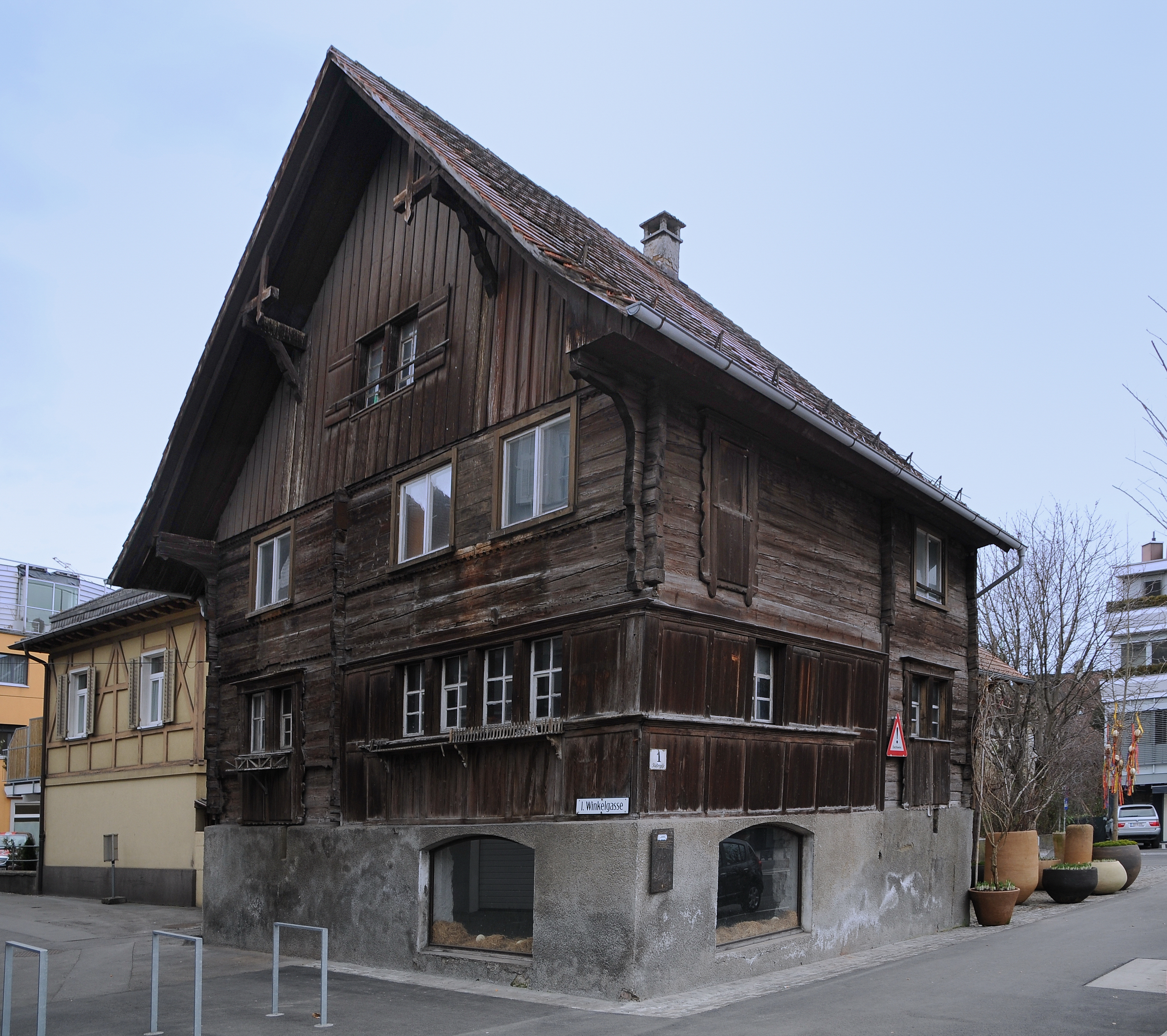 Ecke Klostergasse 1 und Winkelgasse 1 in Markt Dornbirn. aus dem DEHIO Vorarlberg 1983: Rheintalhaus, 2geschossigin Kopfstrickbauweise auf Mauerstock gezimmert, teilweise getäferte Fassade.